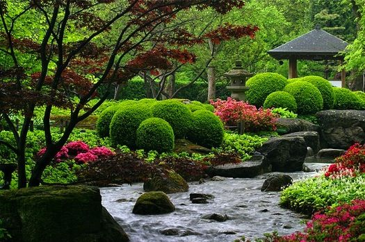 jardin